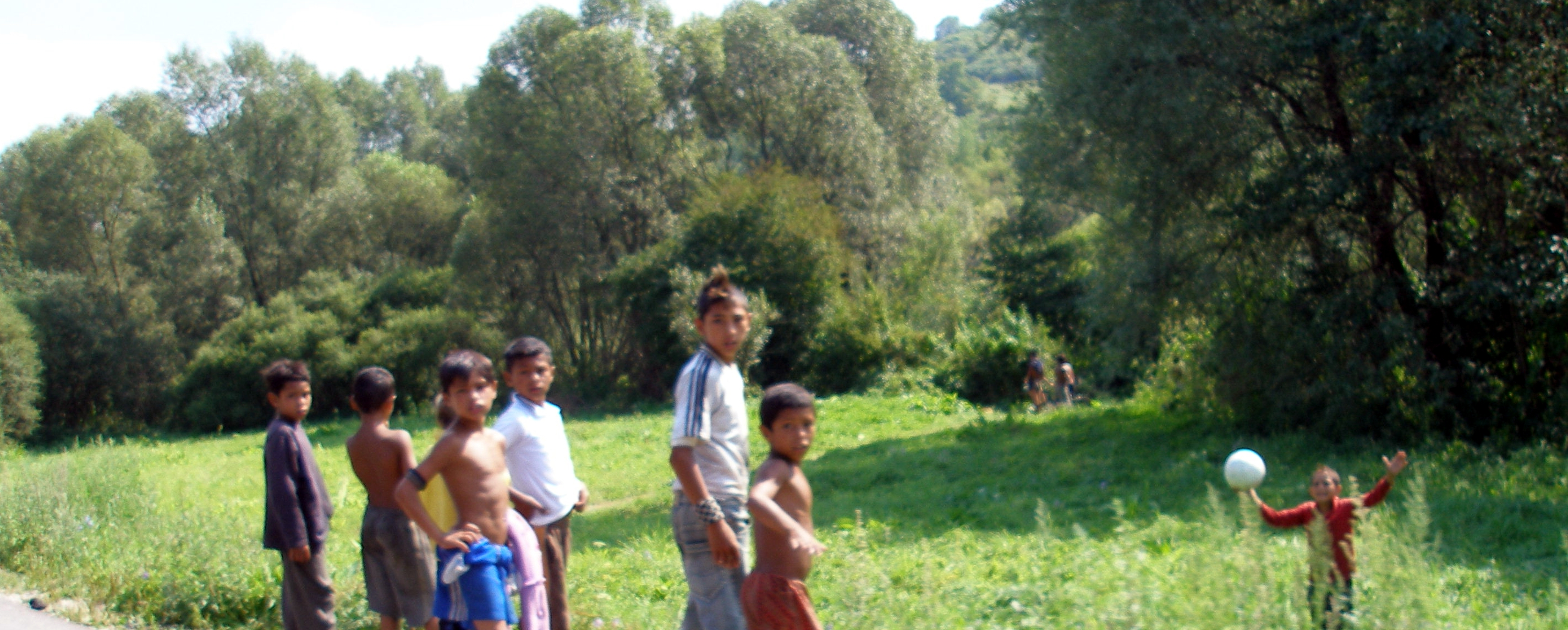 Rómska osada pri obci Chminianske Jakubovany okres Prešov región Šariš